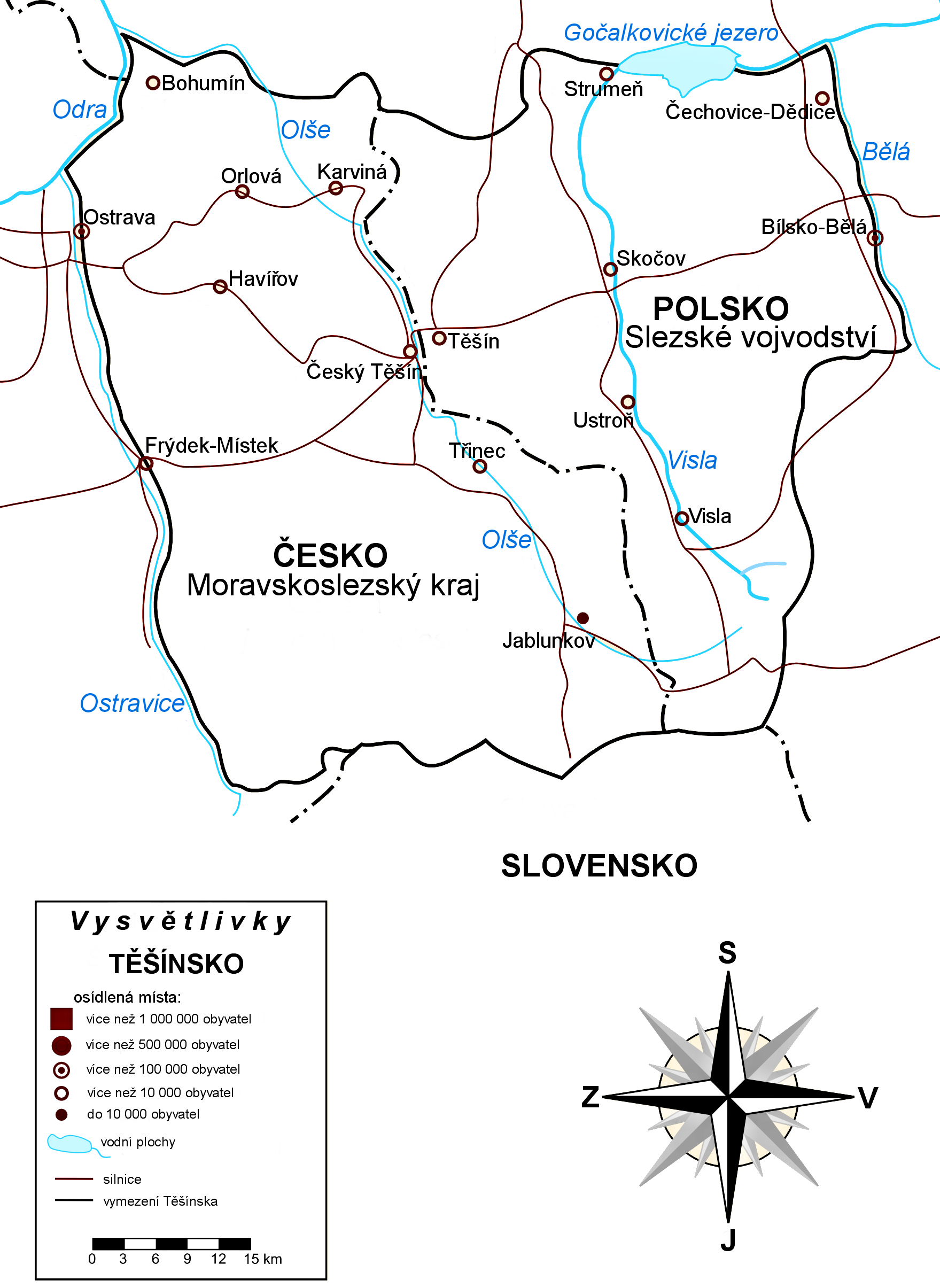 Orientační mapa Těšínska.